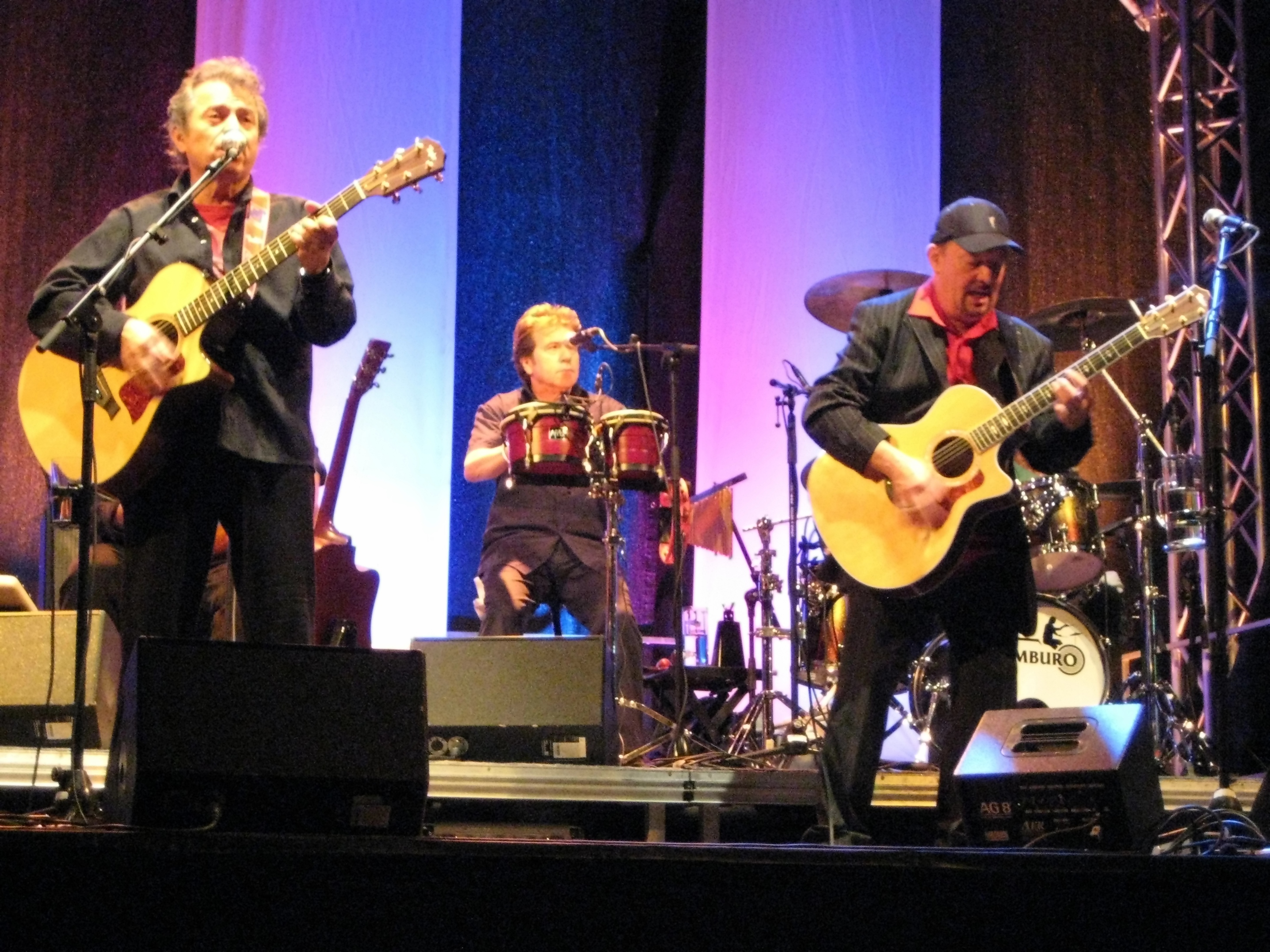 Spider Murphy Gang, Passau (Residenzplatz)